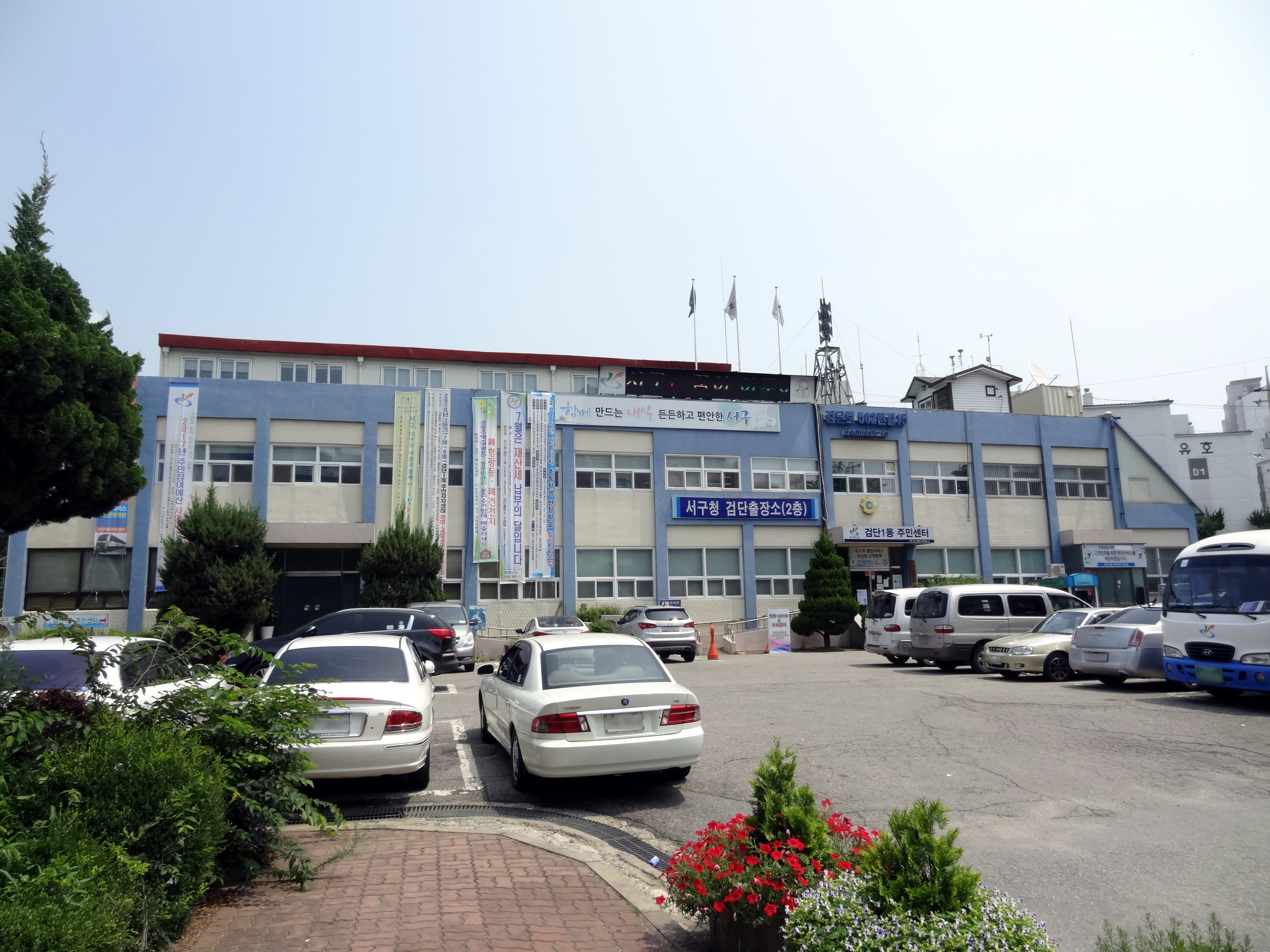 인천광역시 서구청 검단출장소/검단2동 주민센터.